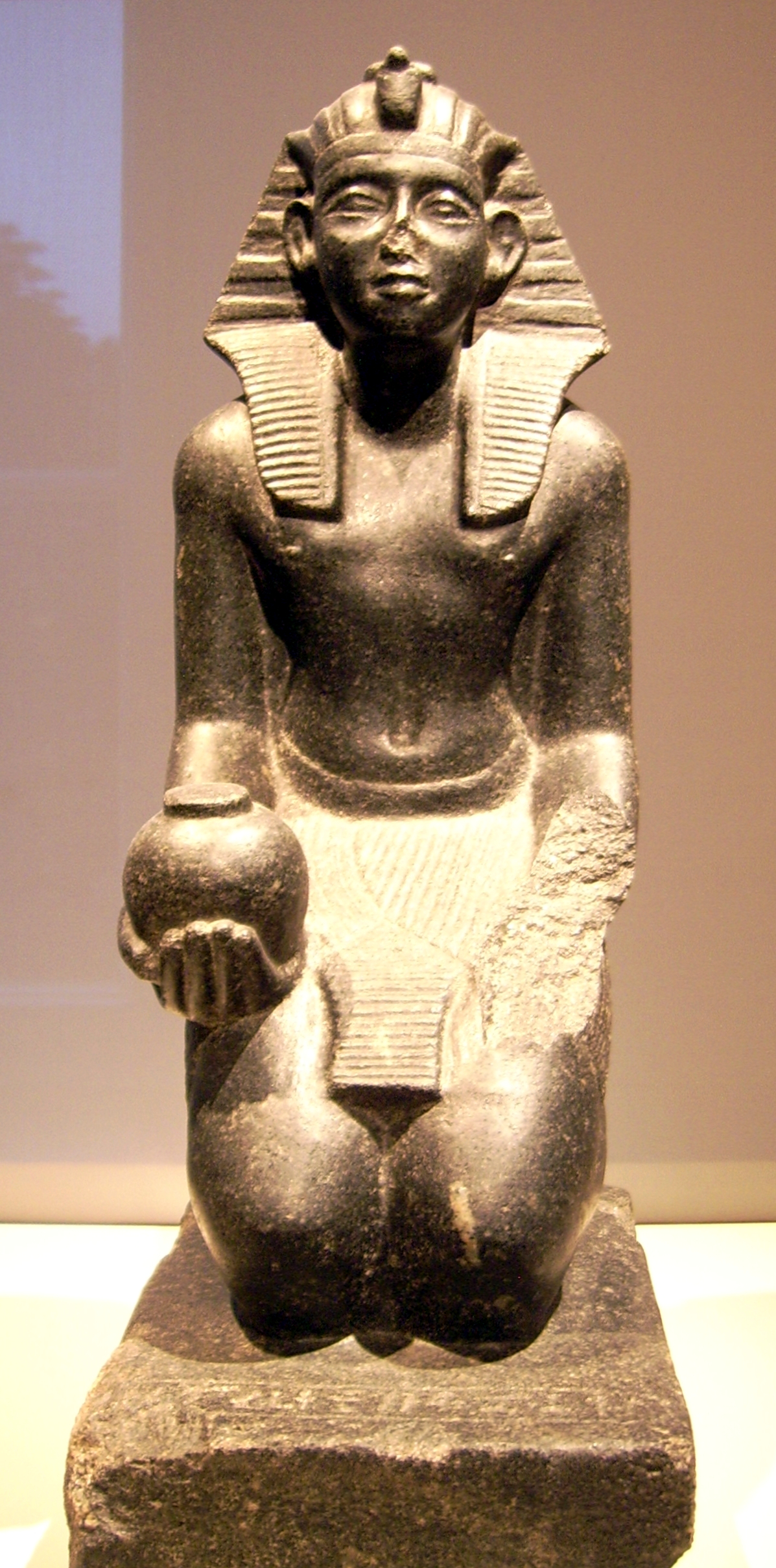 Kniefigur Sobekhoteps V.; 2. Zwischenzeit, 13./14. Dynastie, um 1750/1700 v. Chr.; Granit; Ägyptisches Museum/Altes Museum, Inv.-Nr. 10645